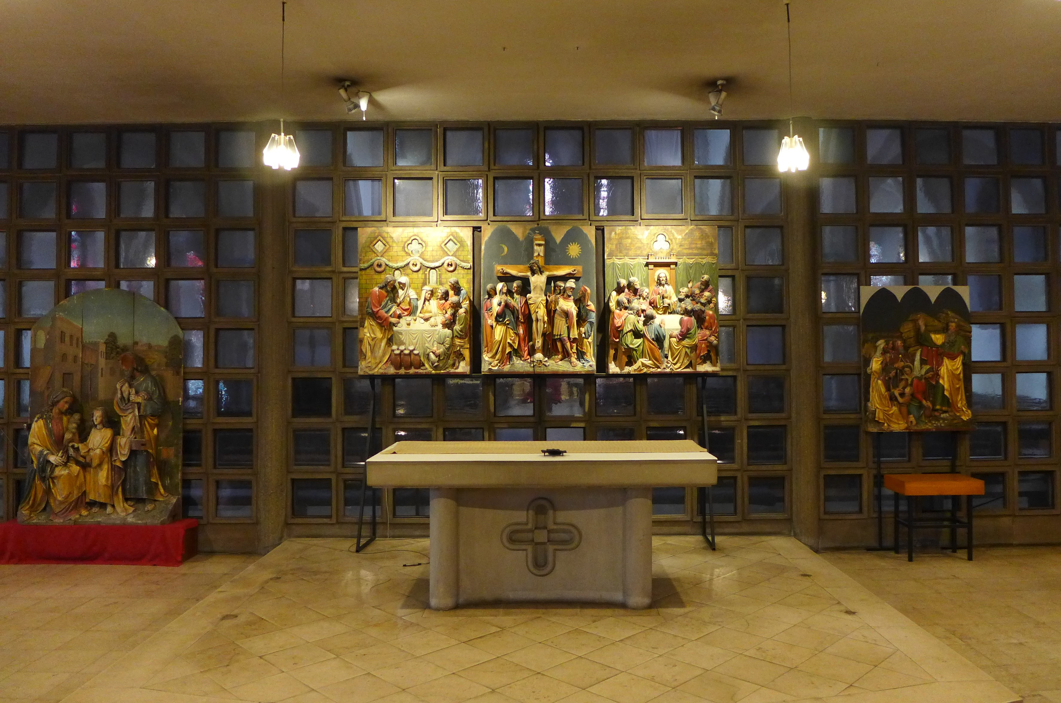 St. Josef (Saarbrücken), Werktagskapelle, Relieftafeln des Hochaltares (Mitte und rechts) und des Josefaltares (links)